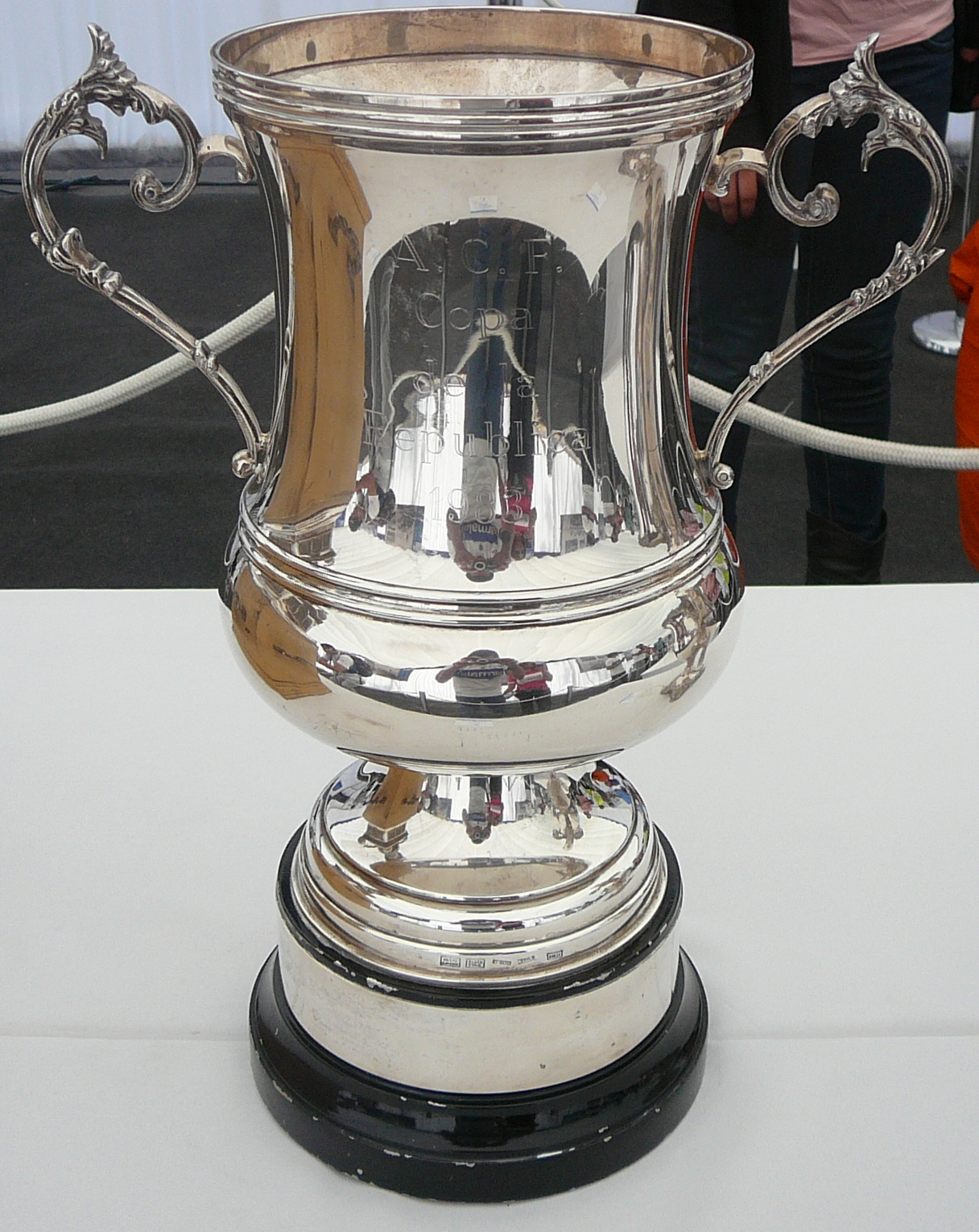 Copa República ganada por Universidad Católica correspondiente a la temporada 1983 y disputada en 1984.